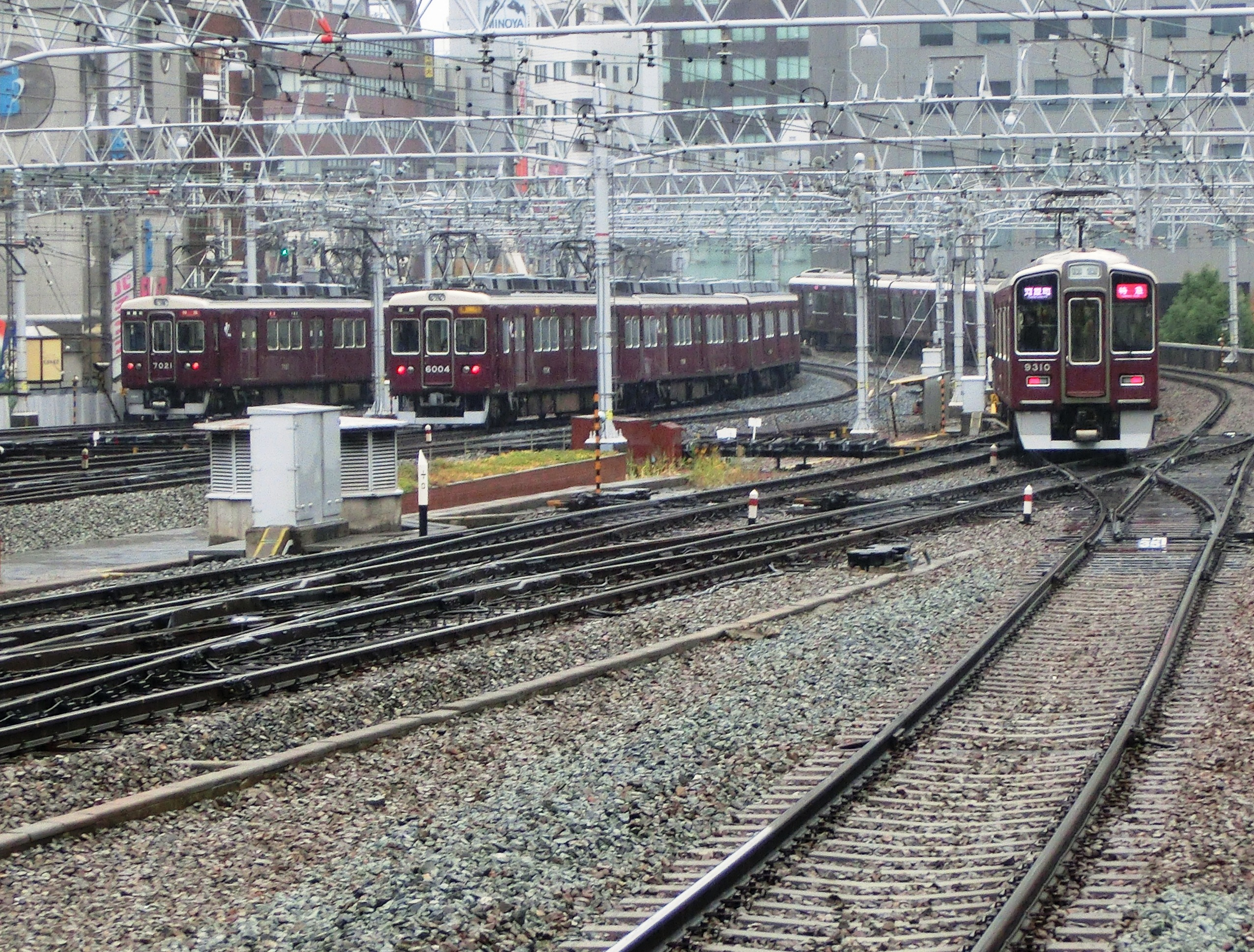 阪急梅田駅を同時発車する3列車。左から、神戸線・特急、宝塚線・急行、京都線・特急の順。